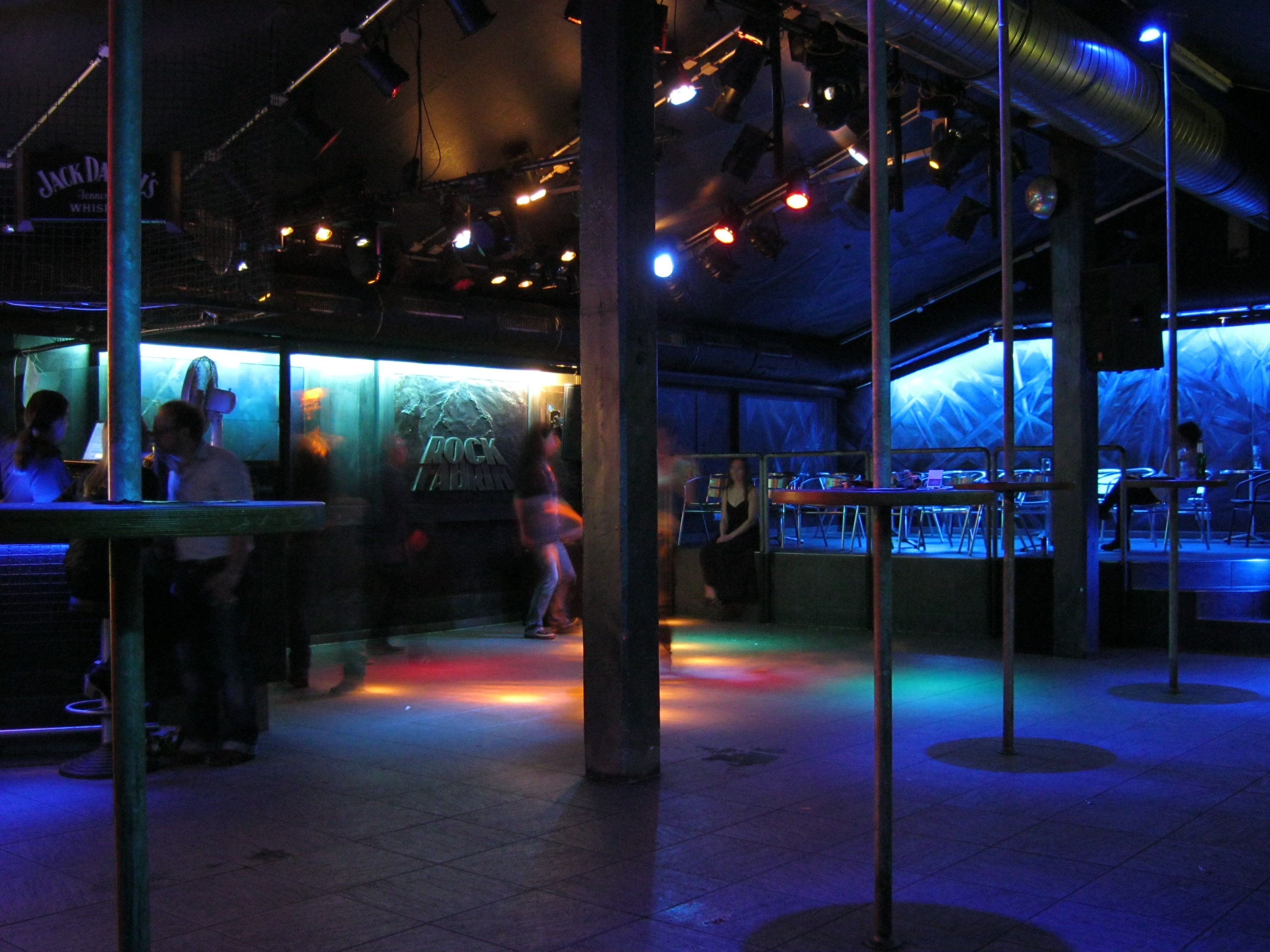 Kleiner Floor der Diskothek Rockfabrikin Ludwigsburg - OpenStreetMap(Info)